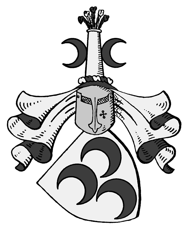 Wappen der von Hanstein